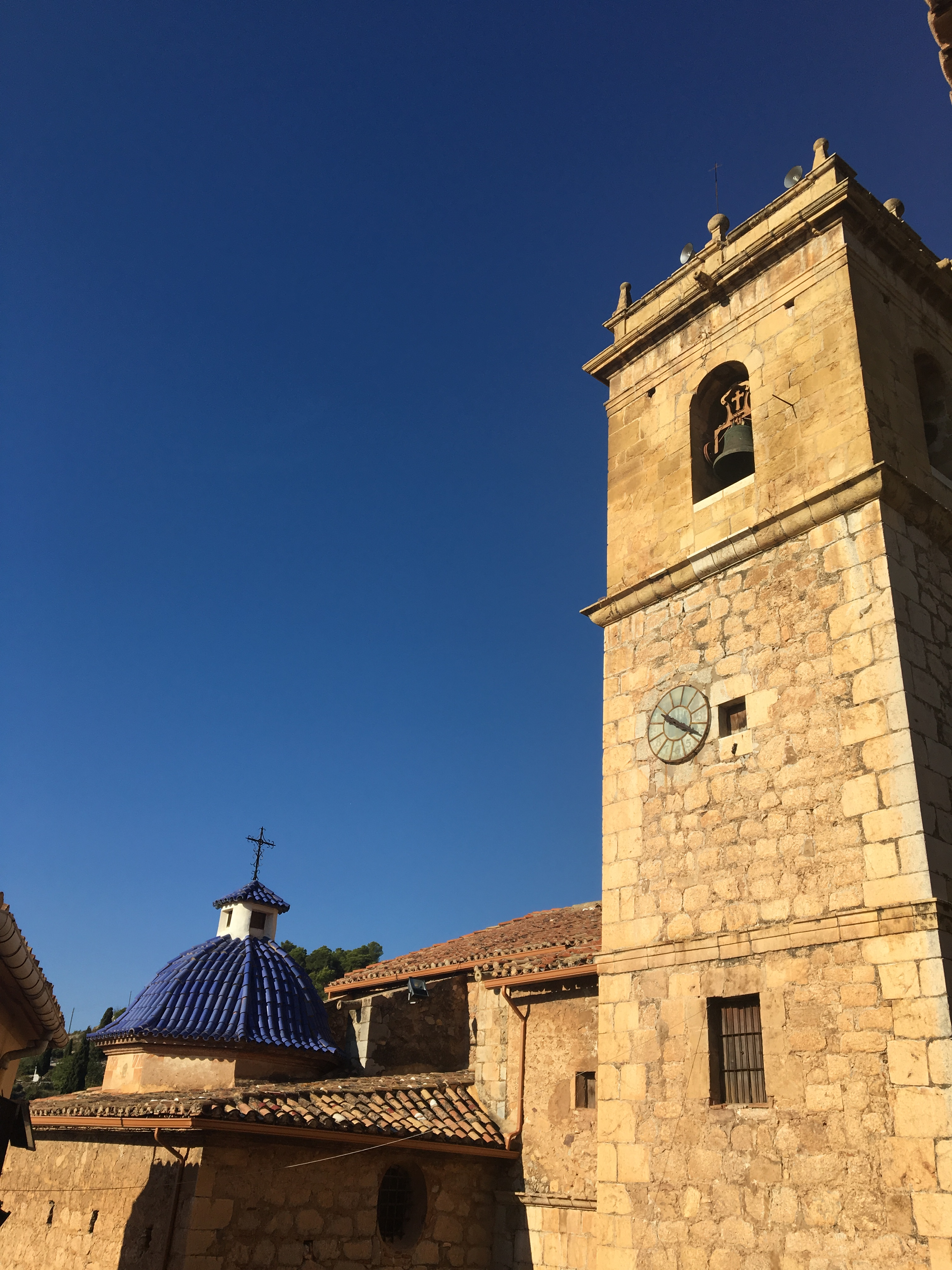 Campanar de San Bartolomé, Borriol